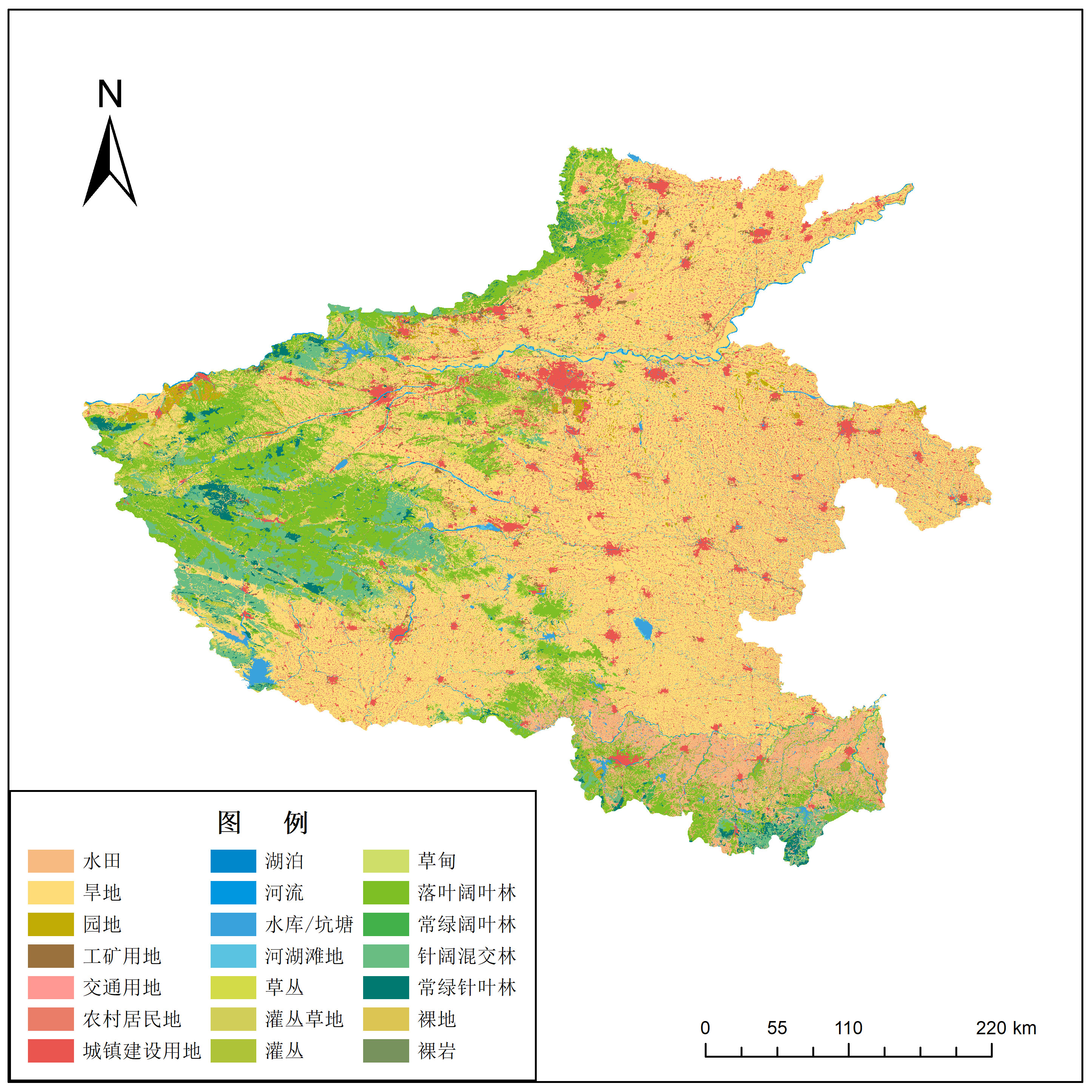 中文（中国大陆）: 2015年河南省土地覆被分类图